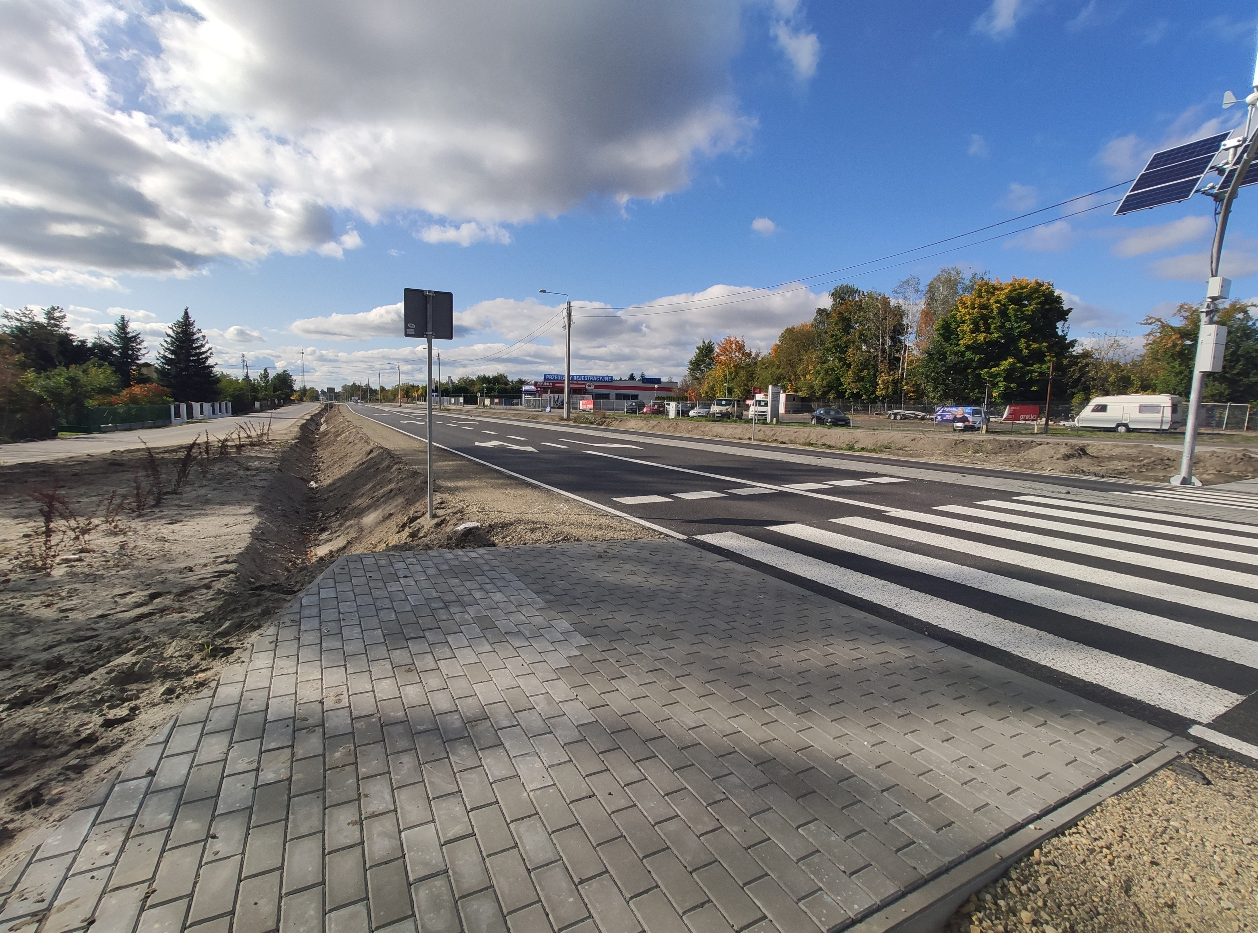 DK48 Kock, skrzyżowanie z DW808